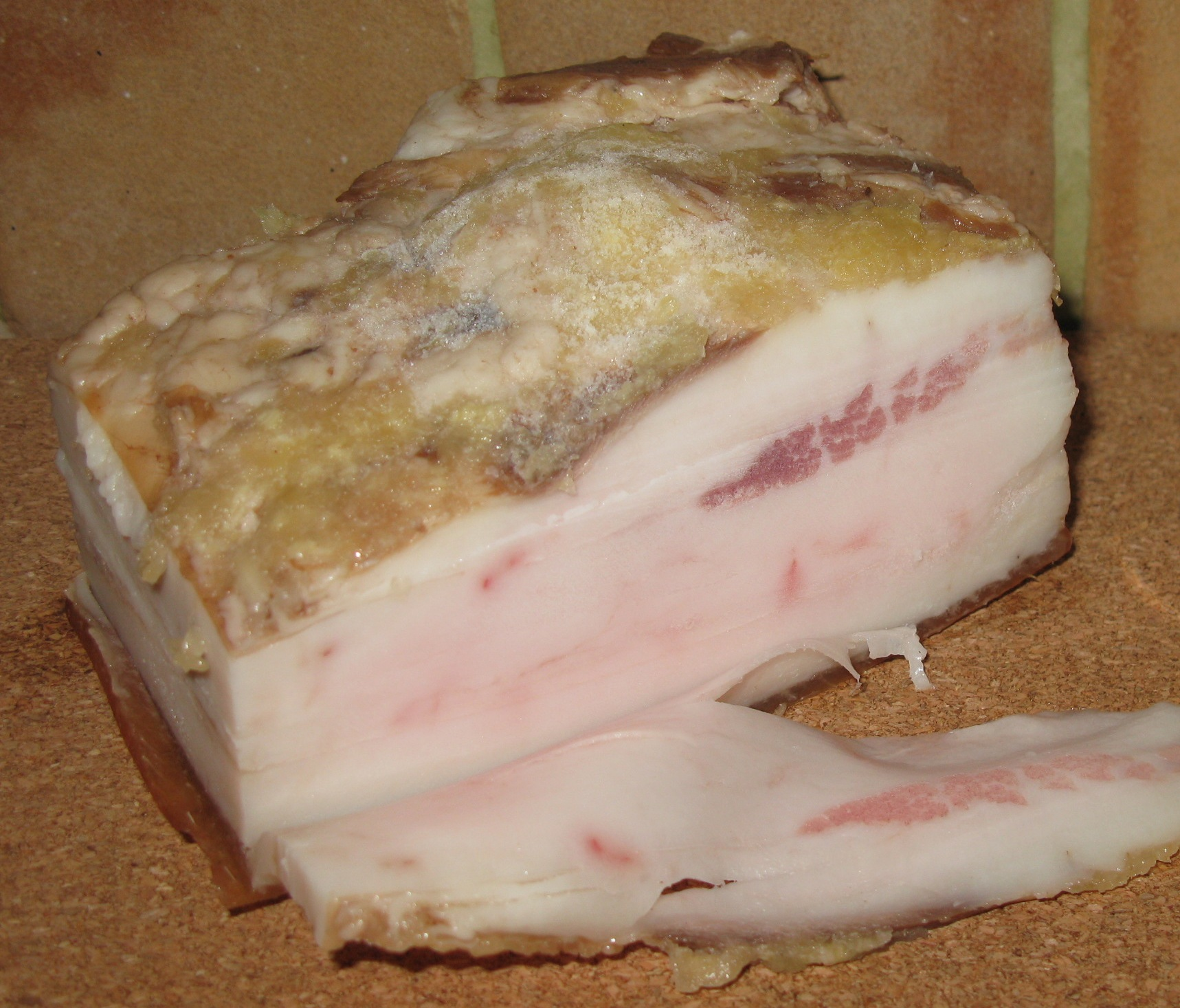 Sało podlaskie